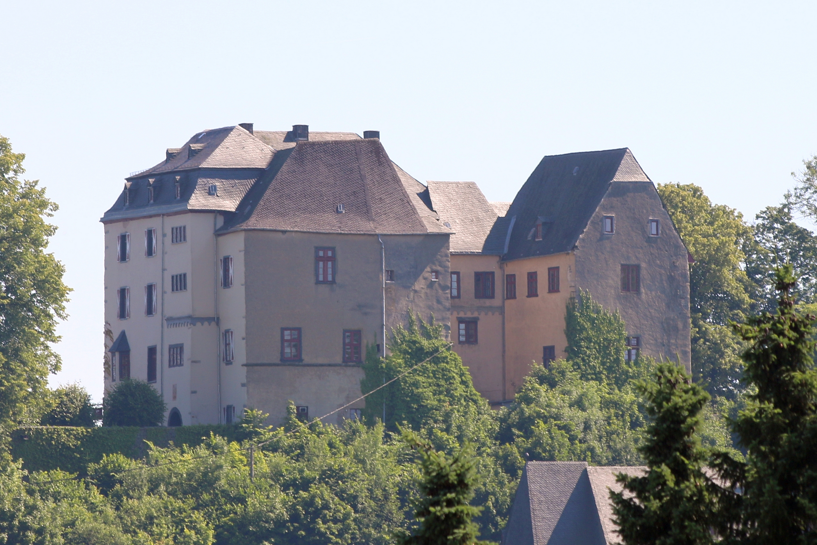 Westerburg, Westerwaldkreis: Schloss Westerburg This is a photograph of an architectural monument.It is on the list of cultural monuments of Westerburg